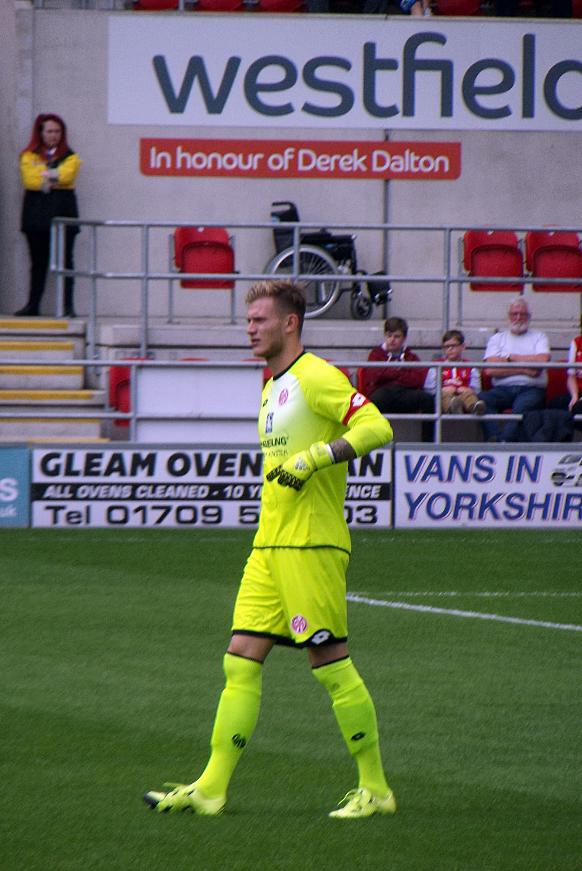 Rotherham Utd v Fsv Mainz 05 (105)